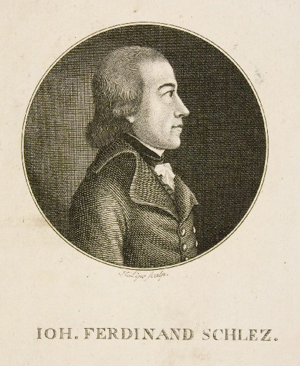 Porträt Johann Ferdinand Schlez